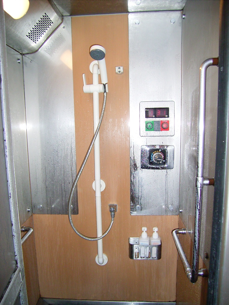 285系特急型電車 シャワー室の室内